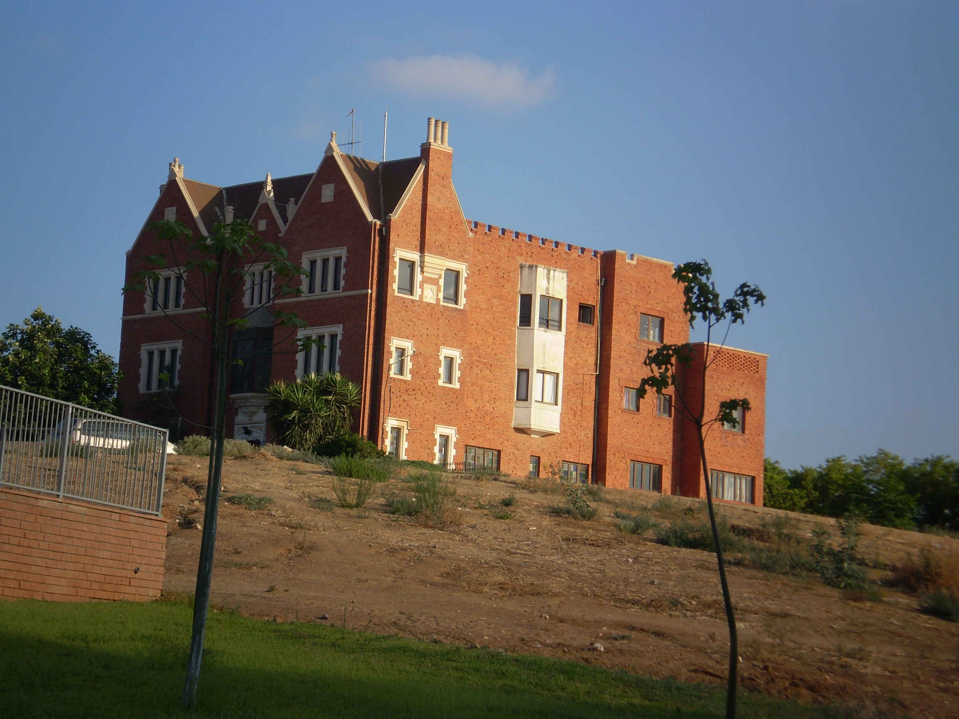 770 - בית he:אגודת חסידי חב"ד בישראל. ממוקם בישוב he:כפר חב"ד. הבניין הוא ההעתק היחידי של he:מרכז חב"ד העולמי - 770 המושלם והמדויק על כל חלקיו, מבפנים ומבחוץ.